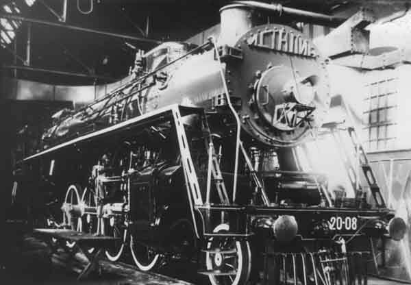 Паровоз ИС20-8 в цехах Ворошиловградского паровозостроительного завода